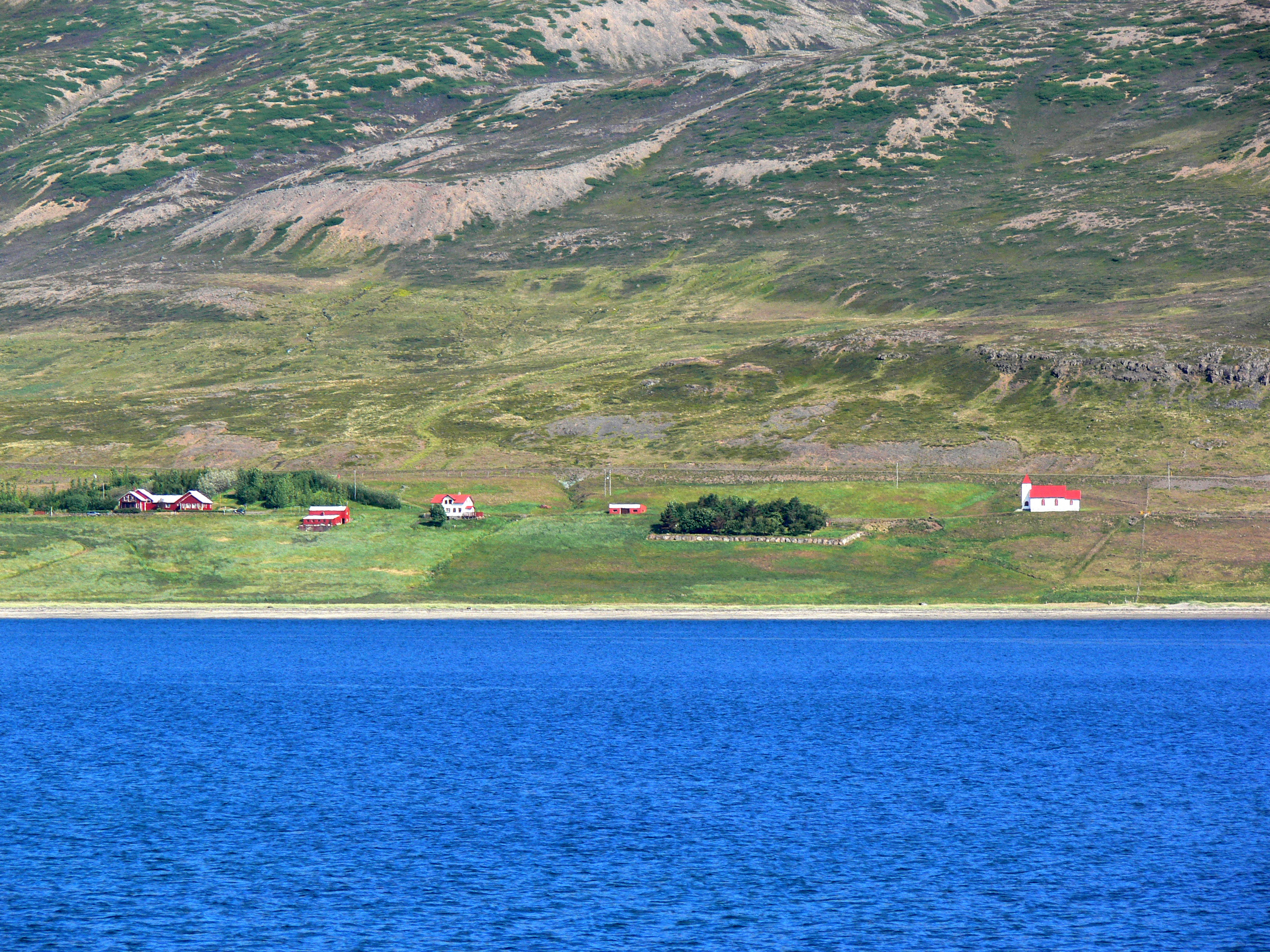 Kirche von Mýrar am Dýrafjörður gegenüber von Þingeyri.